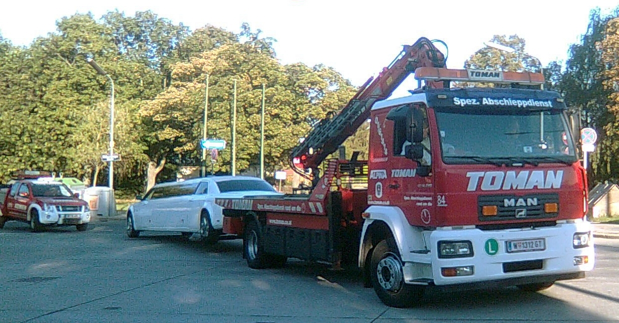 Abschleppdienst für eine Stretch-Limousine